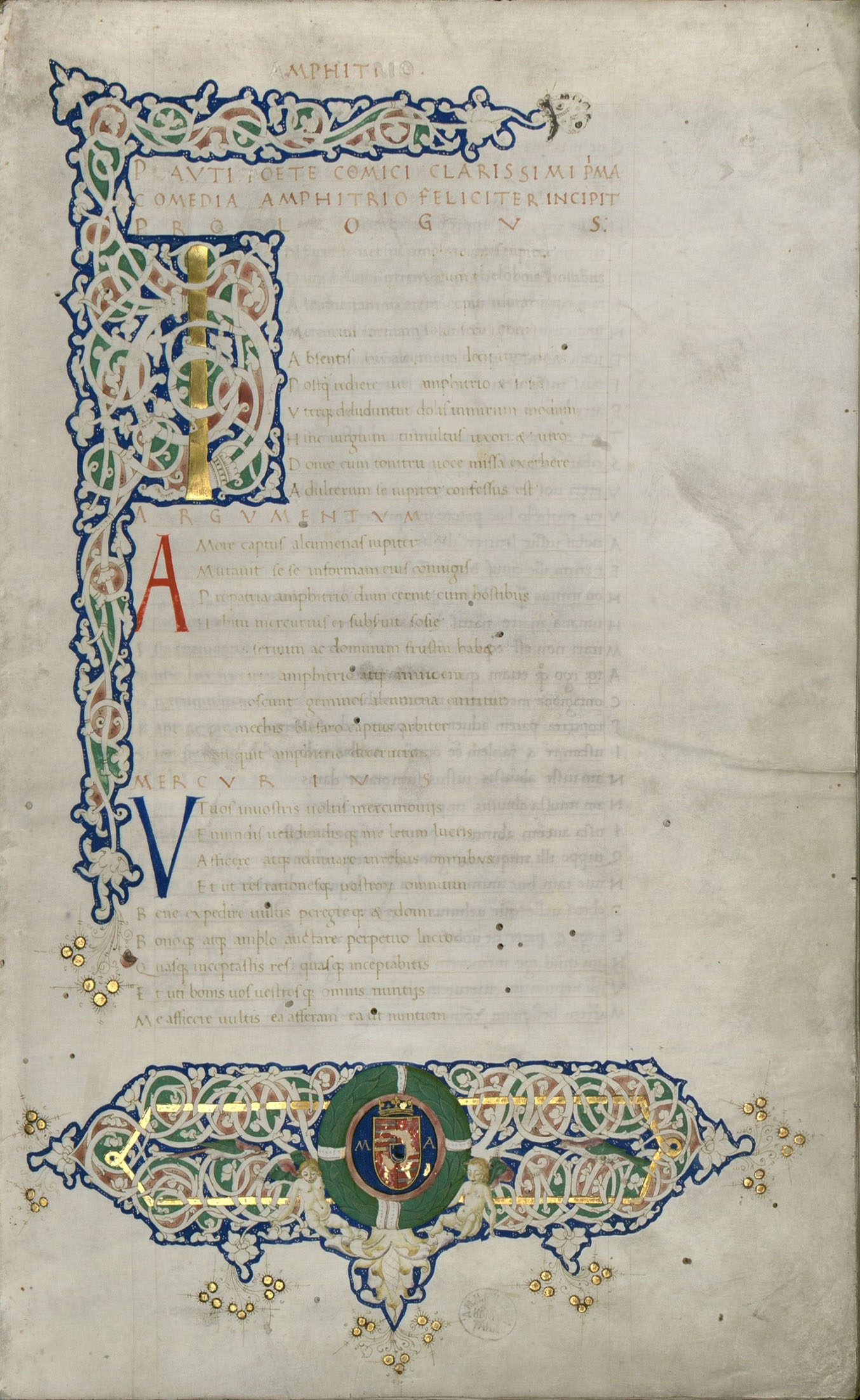 Corvina oldala. Cod. Lat. 241 Plautus, Titus Maccius: Comediae 1459 el?tt. Firenze, Pergamen.